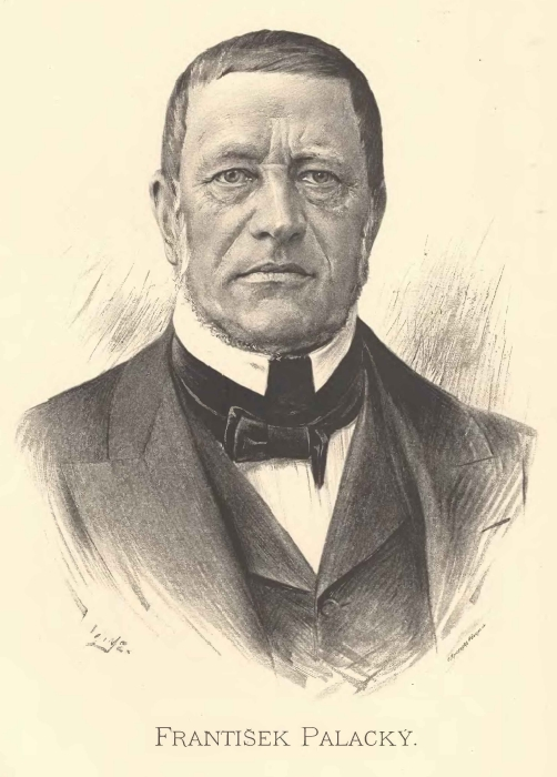 František Palacký (1798-1876), český historik a politik